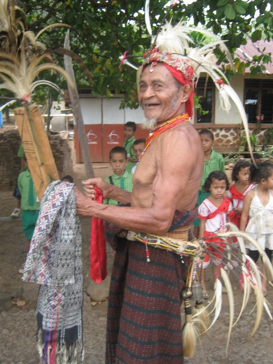 Bapak Talu Koten dalam busana adat Lewoloba